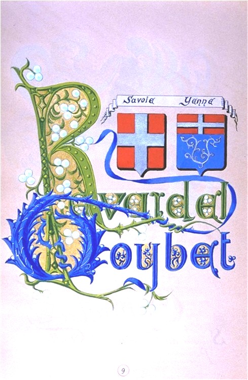 Famille Revardel XVème siècle devient Revardel dit Goybet, puis Goybet au cours du XVIIème siècle.Extrait enluminure , livre de famille de Mariano Goybet